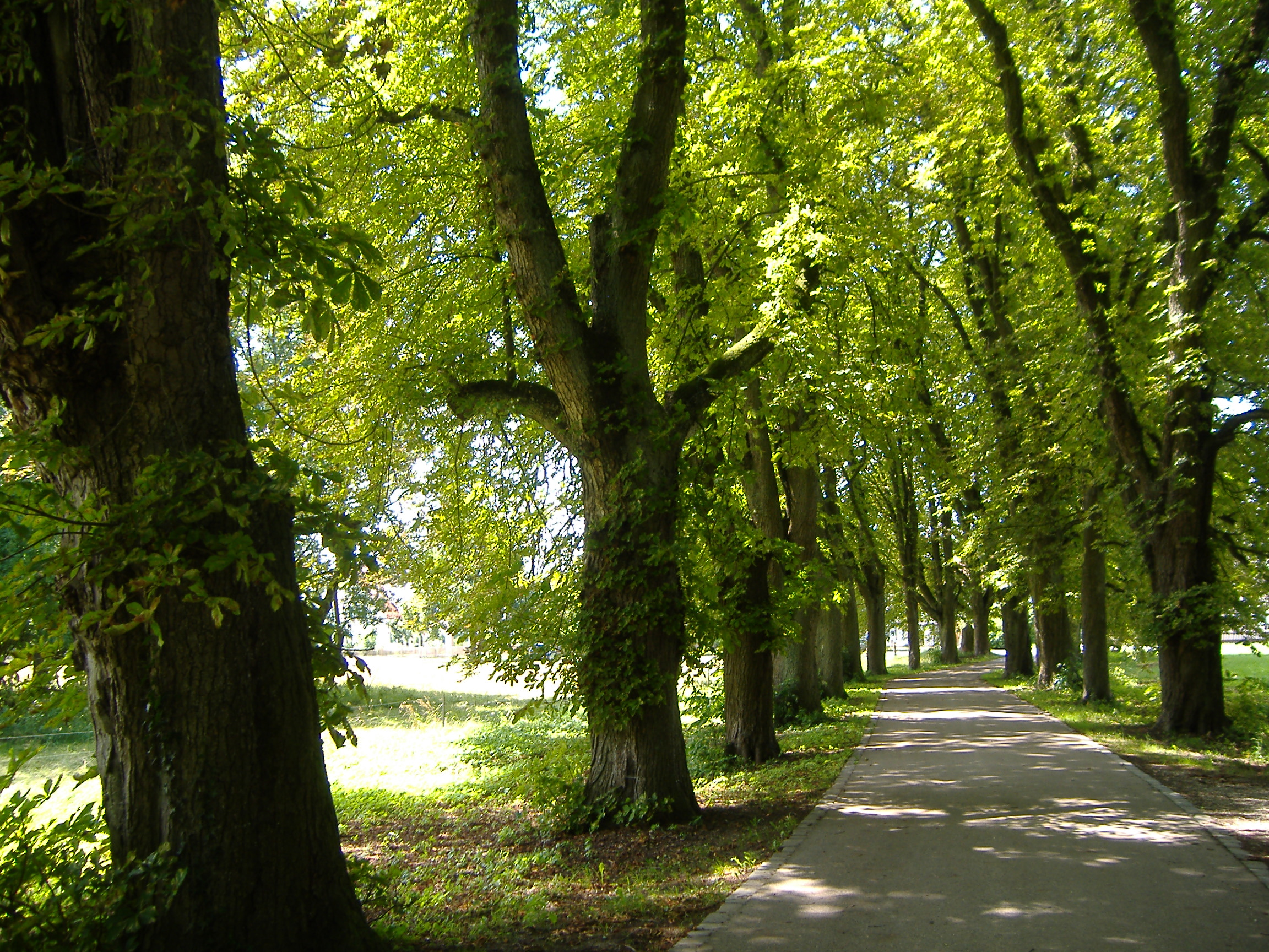 Schlossallee in Oberndorf am Lech